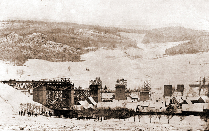 Diese leider nur gering aufgelöste Wiedergabe eines Architektur- und Landschafts-Fotos aus der Urheberschaft der Familie um Ferdinand Tellgmann aus der Zeit um 1877 zeigt das Lengenfelder Viadukt während der Bauzeit ...